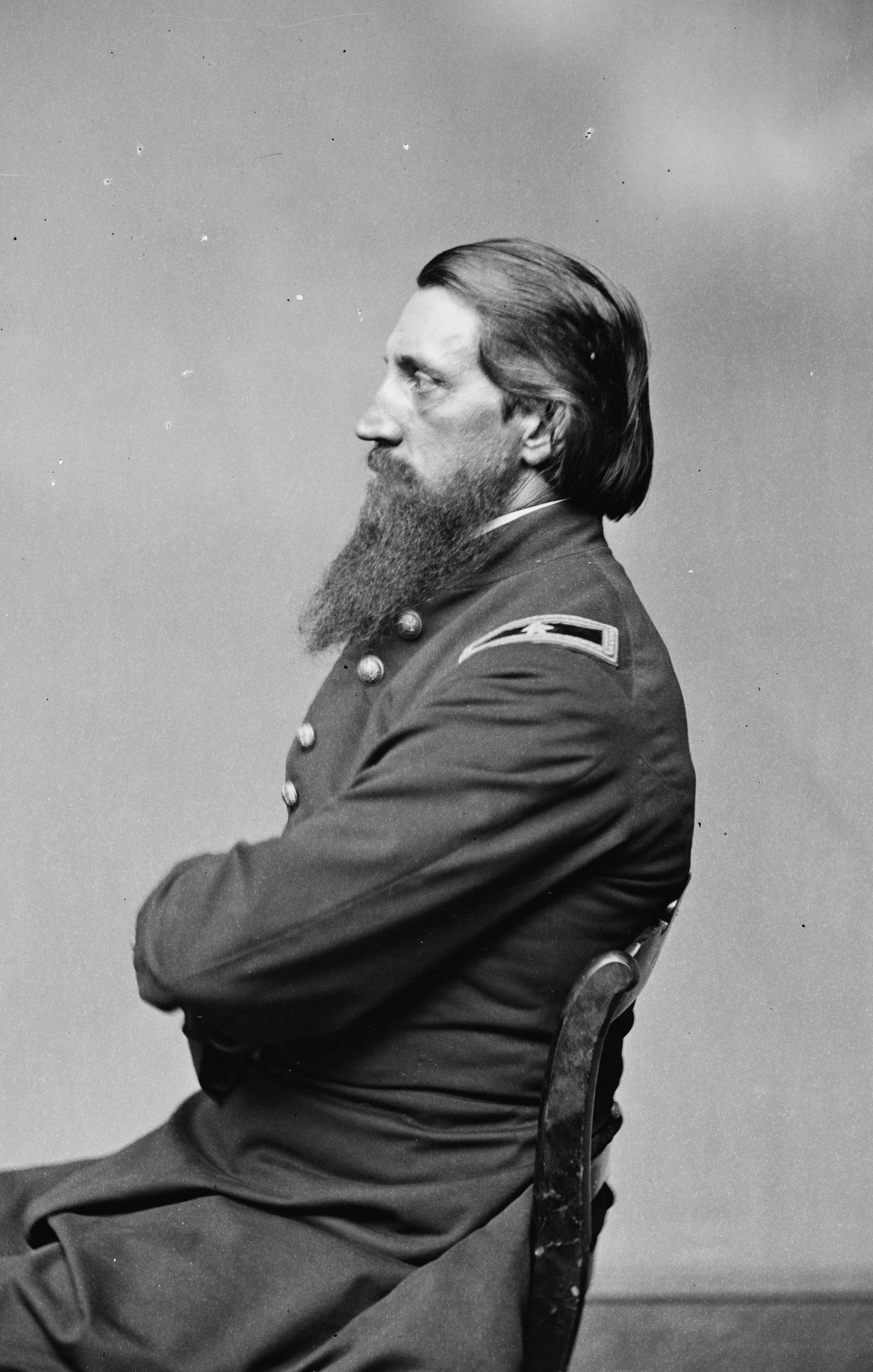 Brigadier General Alfred W. Ellet